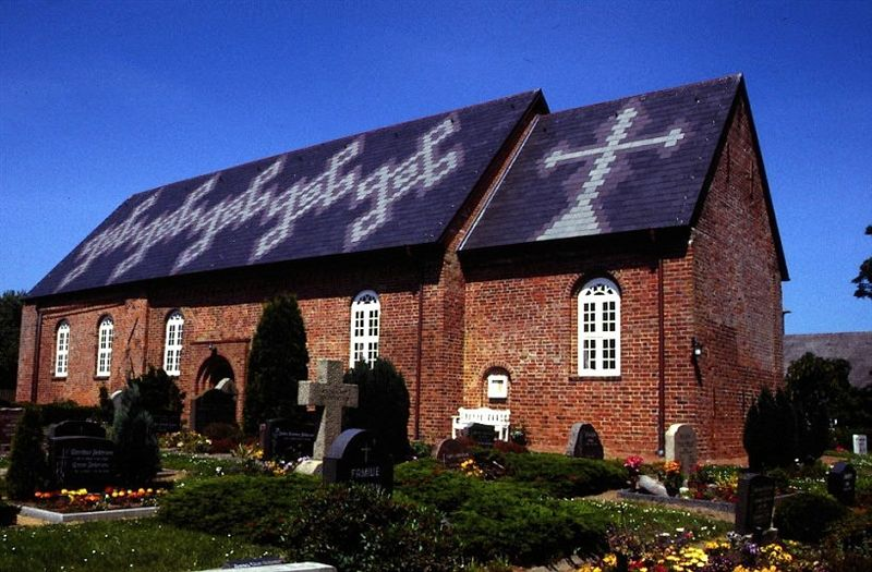 Rodenäs Kirke i Sydslesvig. Rodenäs kirke